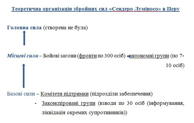 Теоретична організація збройних сил «Сендеро Луміносо» в Перу